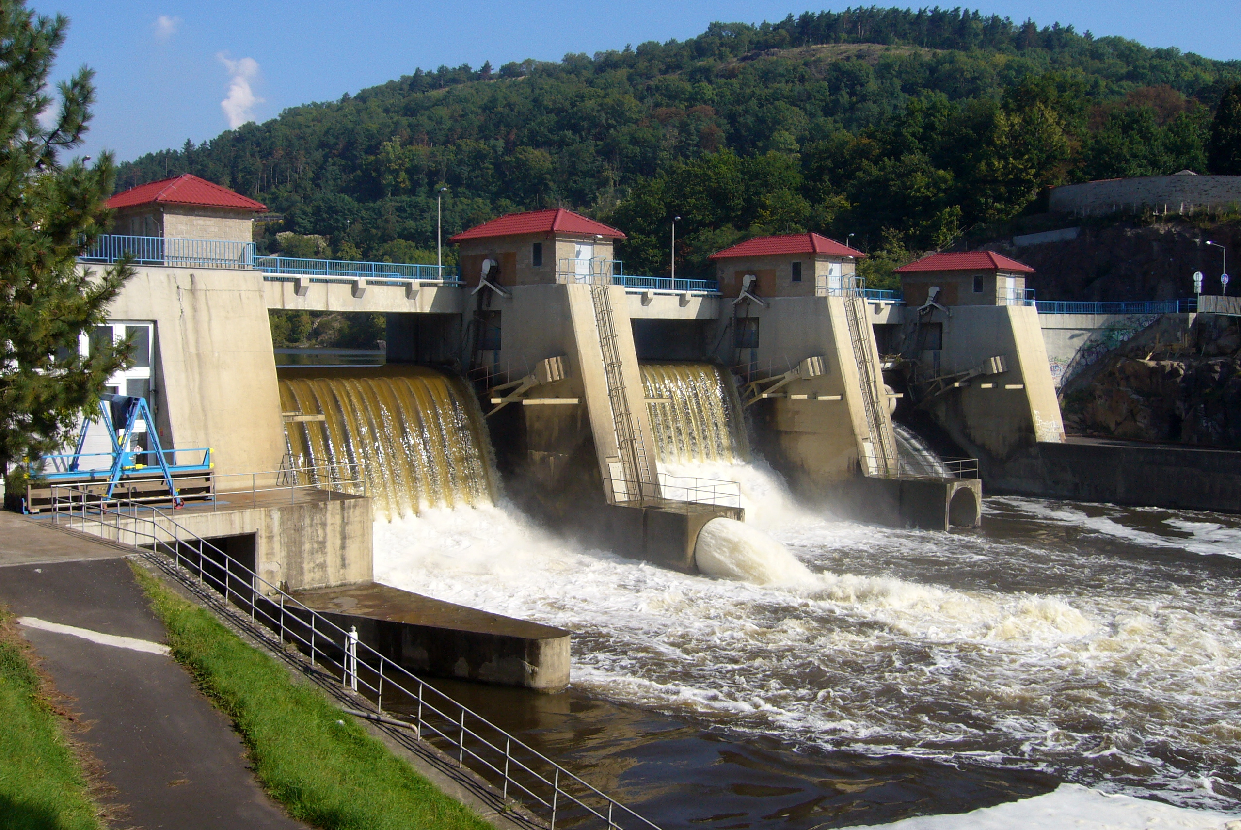 Hráz přehrady